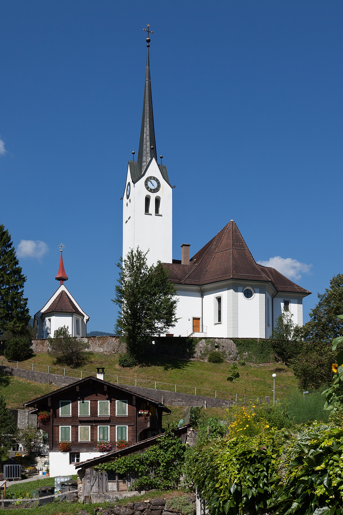 Pfarrkirche St.Laurentius (1630-55, erneuert 1744), Beinhaus (1657-61) und Pfarrhaus (ca. 1630) in Giswil